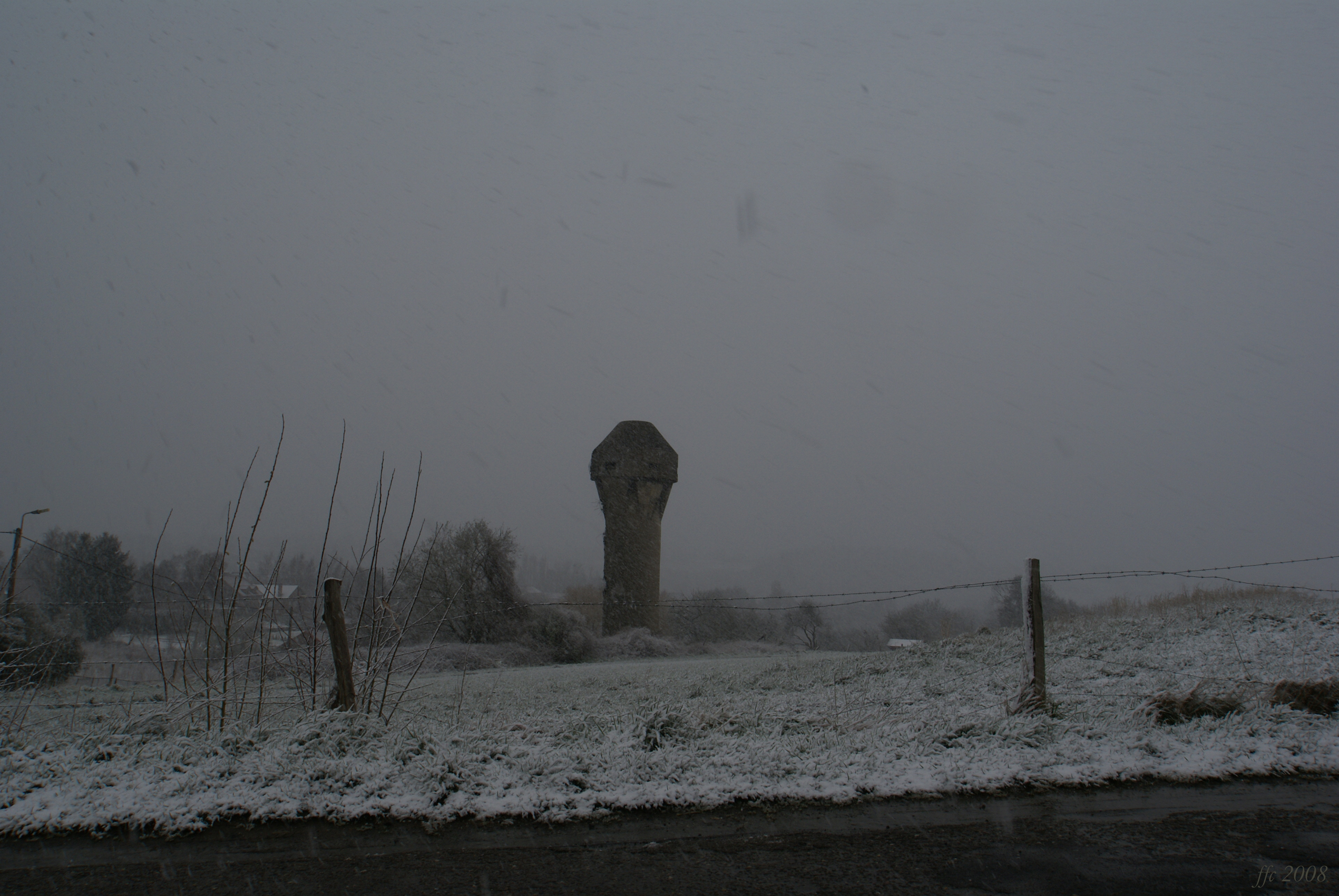 Fort de Flémalle (Belgium) Ventilation tower Torre de ventilació de la fortificació Tour d'aération du fort Verluchtingstoren